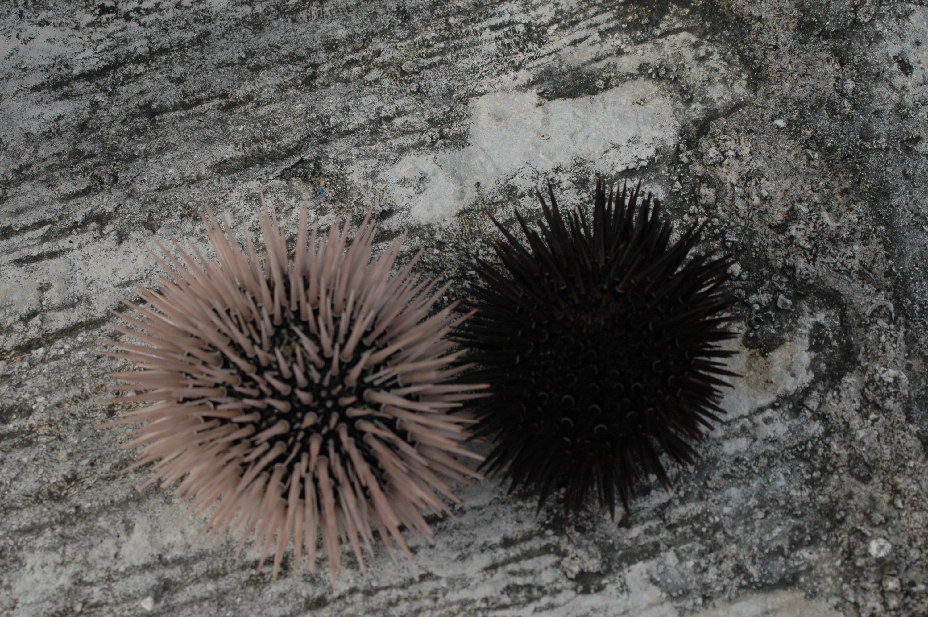 Sea Urchins Sipaway Island Negros Philippines